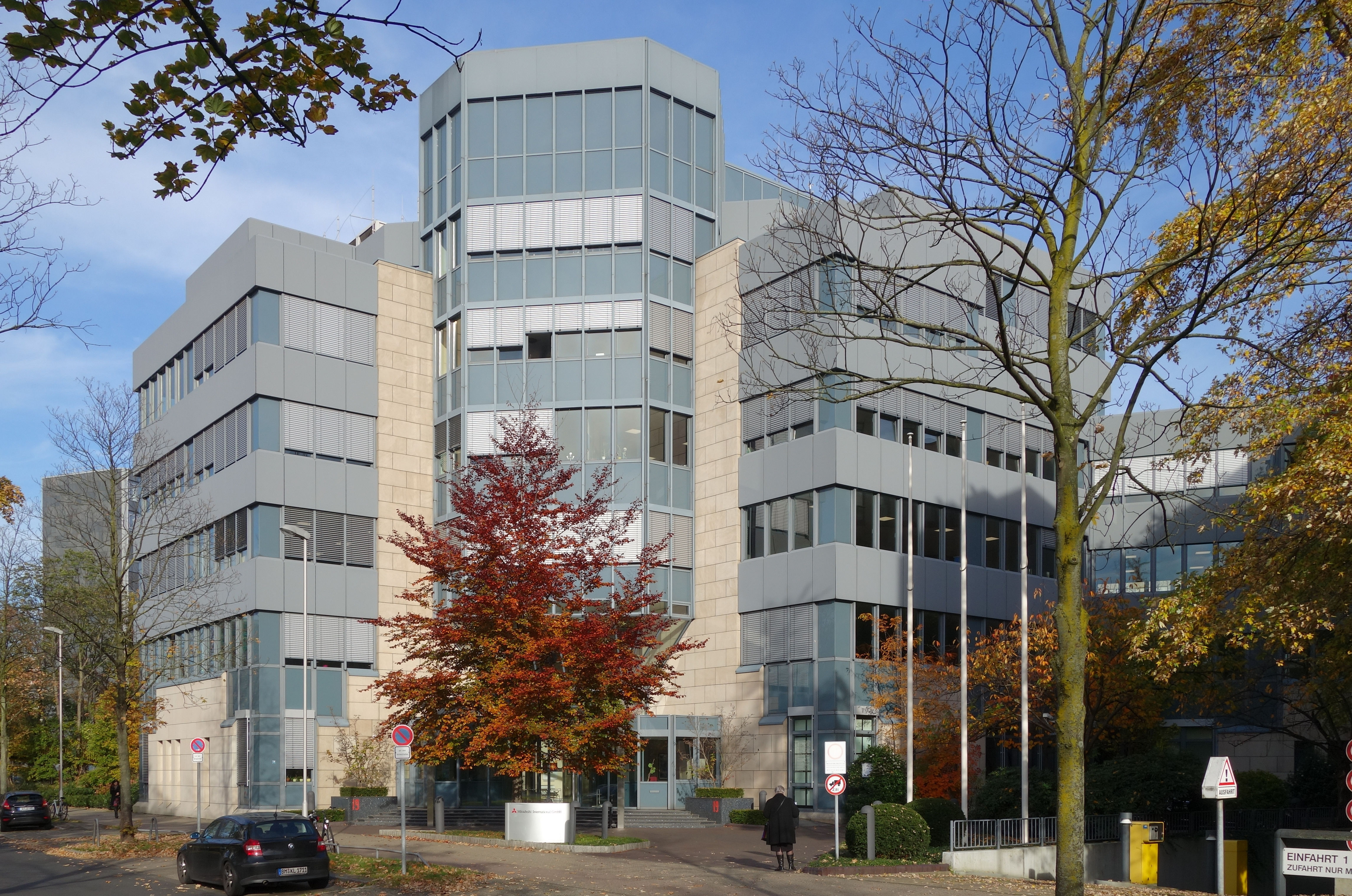 Mitsubishi Corporation, Düsseldorf, Kennedydamm 19.